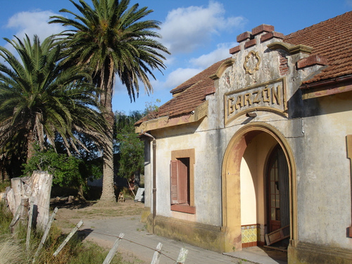 Station Garzón, Uruguay